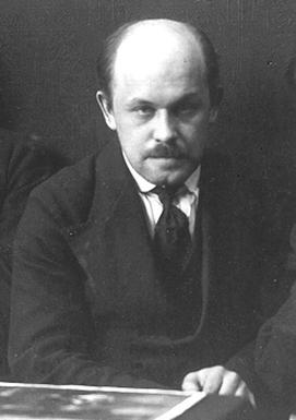 Николай Трийк, художник